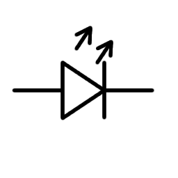 Schematisk symbol för en LED (Light Emitting Diod) Gjord av: Daniel Ryde, Skövde 2004-08-31 Licens